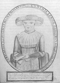 Portret van Cynthia Lenige (1755-1780), getekend door haar vader Dirk Lenige